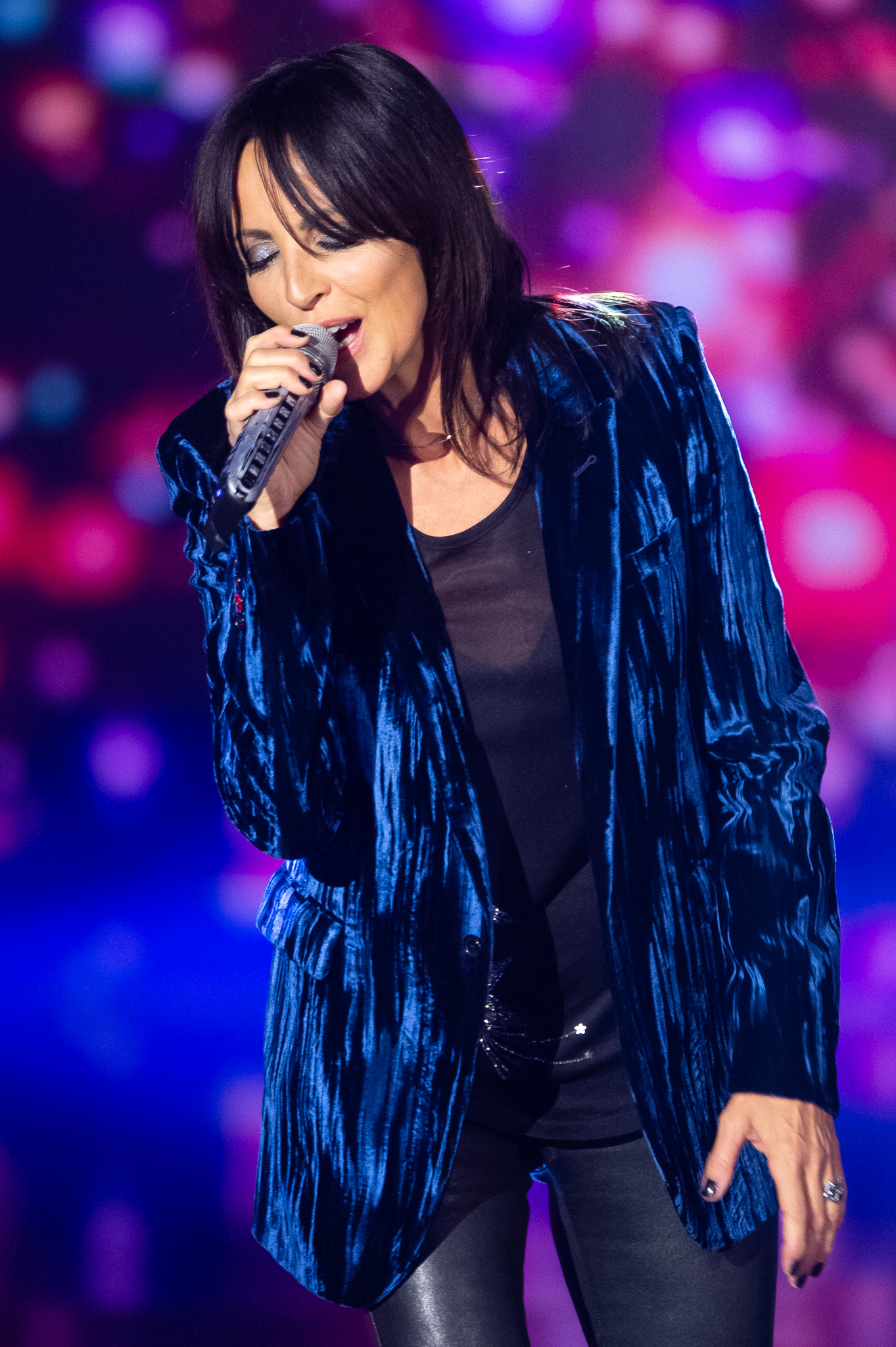 BR,Bayerisches Fernsehen,Frankenhalle,Live-Sendung,Nena,Sternstunden-Gala,Sternstundengala